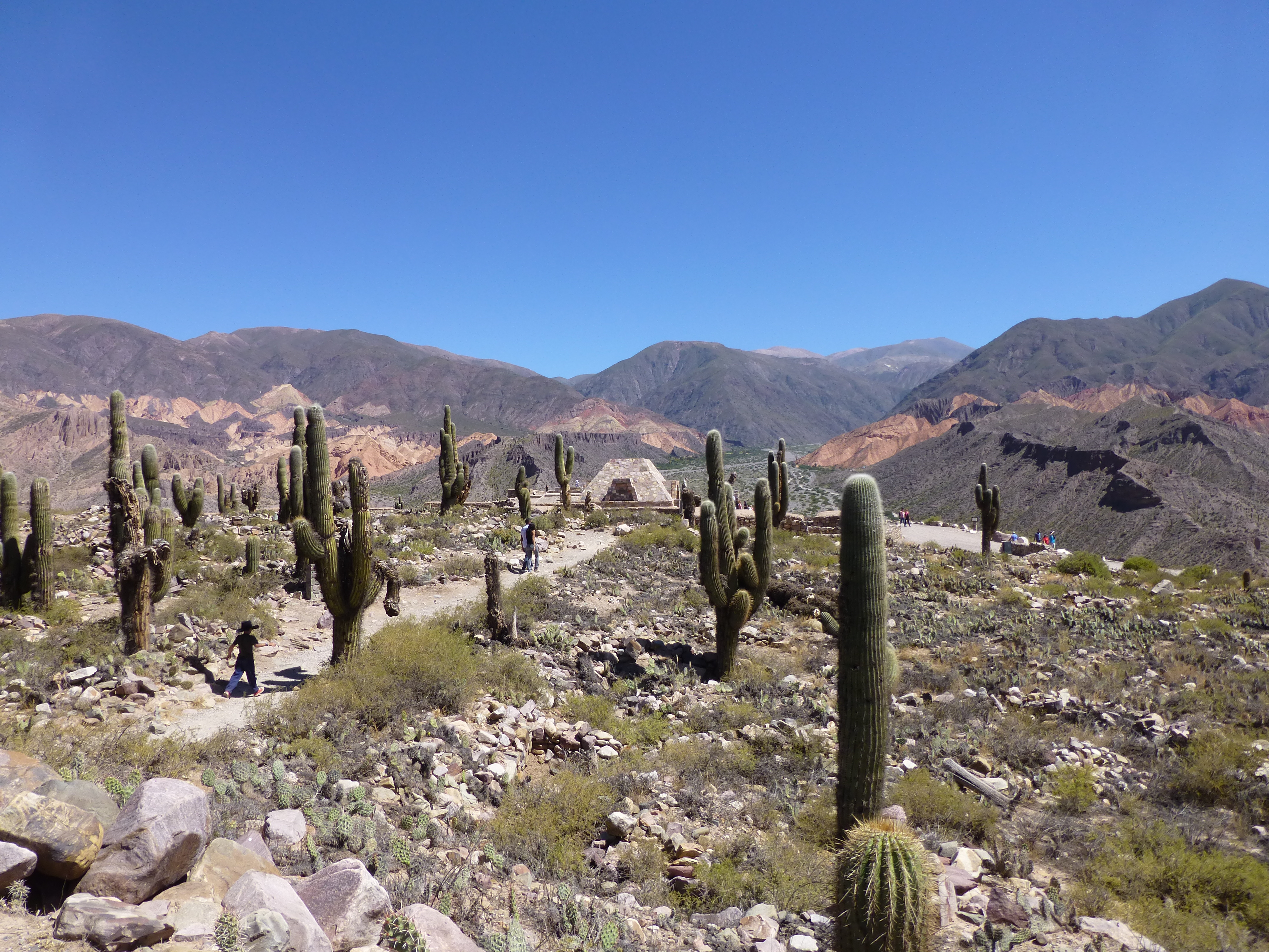 Yacimiento arqueológico Pucará de Tilcara